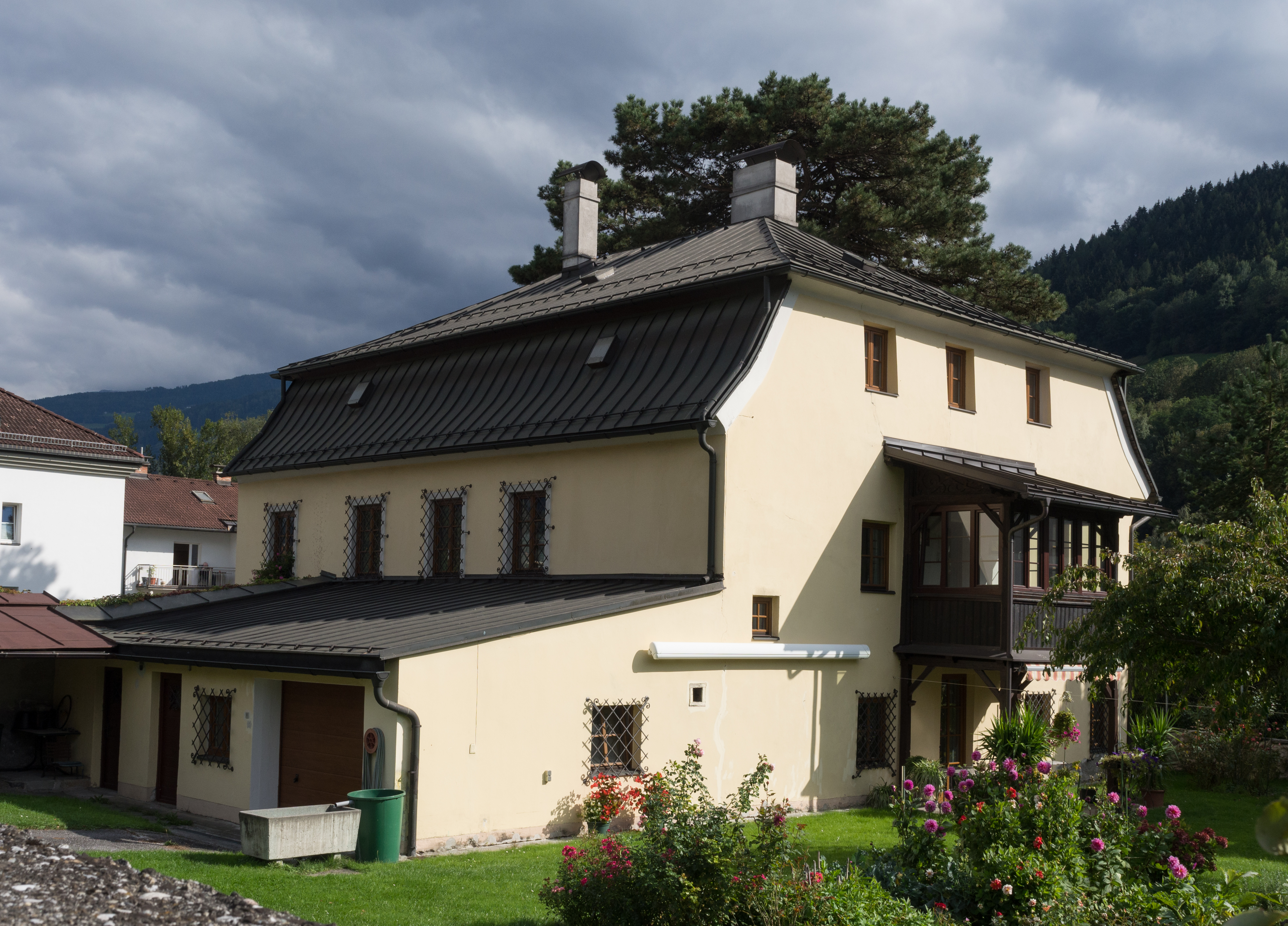 Ehem. Bezirksforstinspektion Münzergasse 14 von Nordwesten